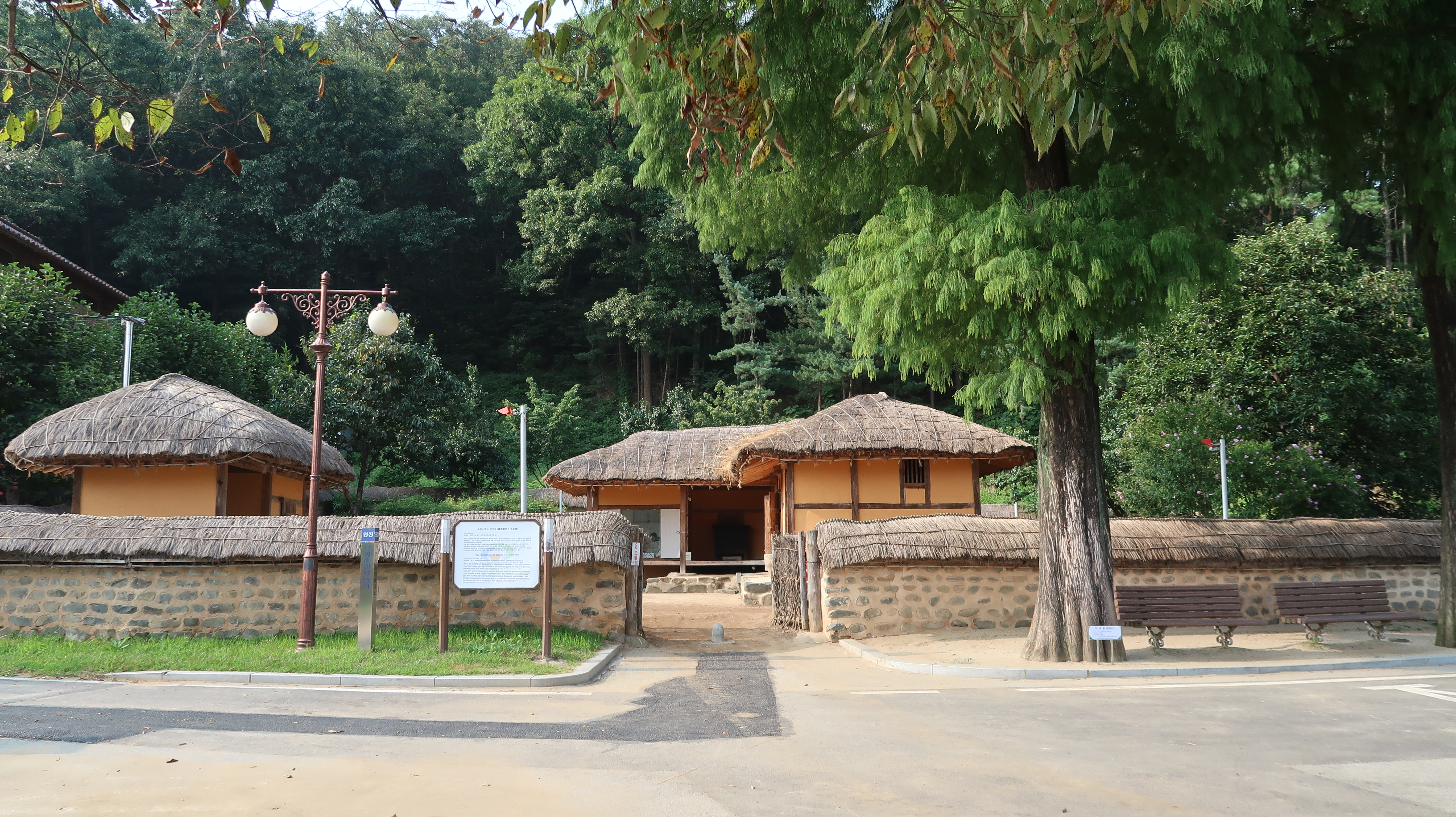 유관순열사-유적-The-Relics-of-Patriot-Yu-Gwansun